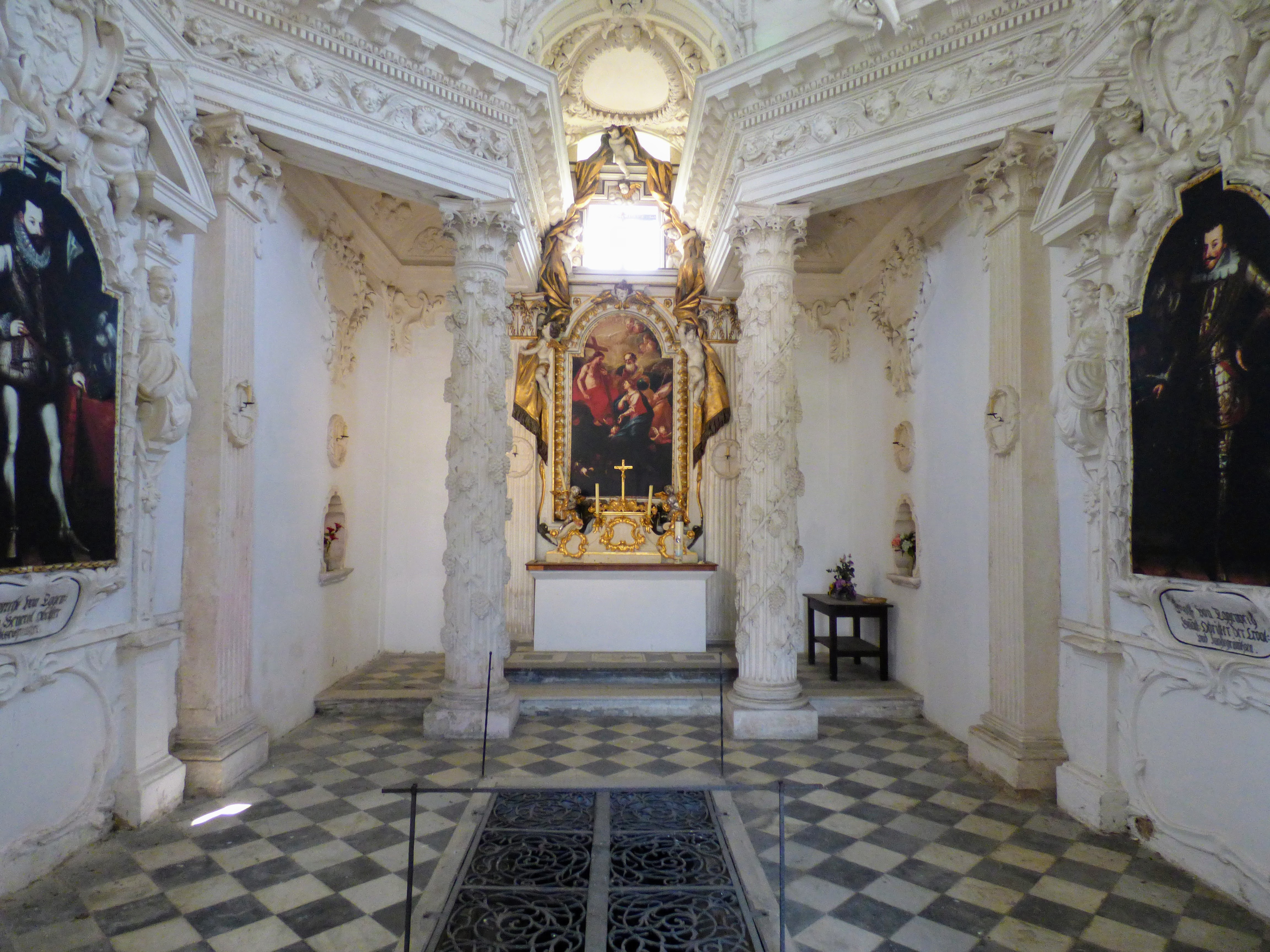 Mausoleum des Ruprecht von Eggenberg, Ehrenhausen, Steiermark